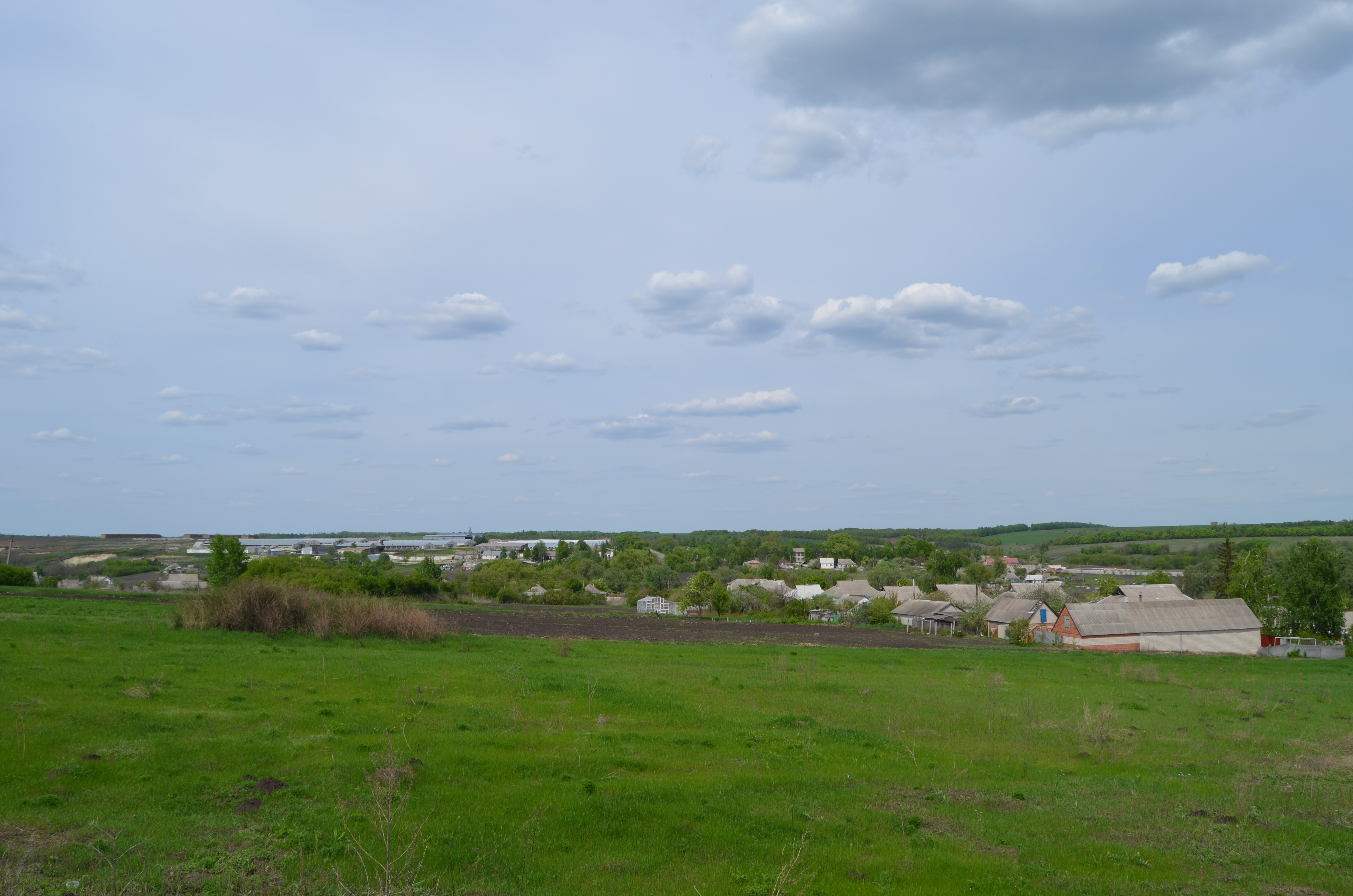 Шестакове загальним планом